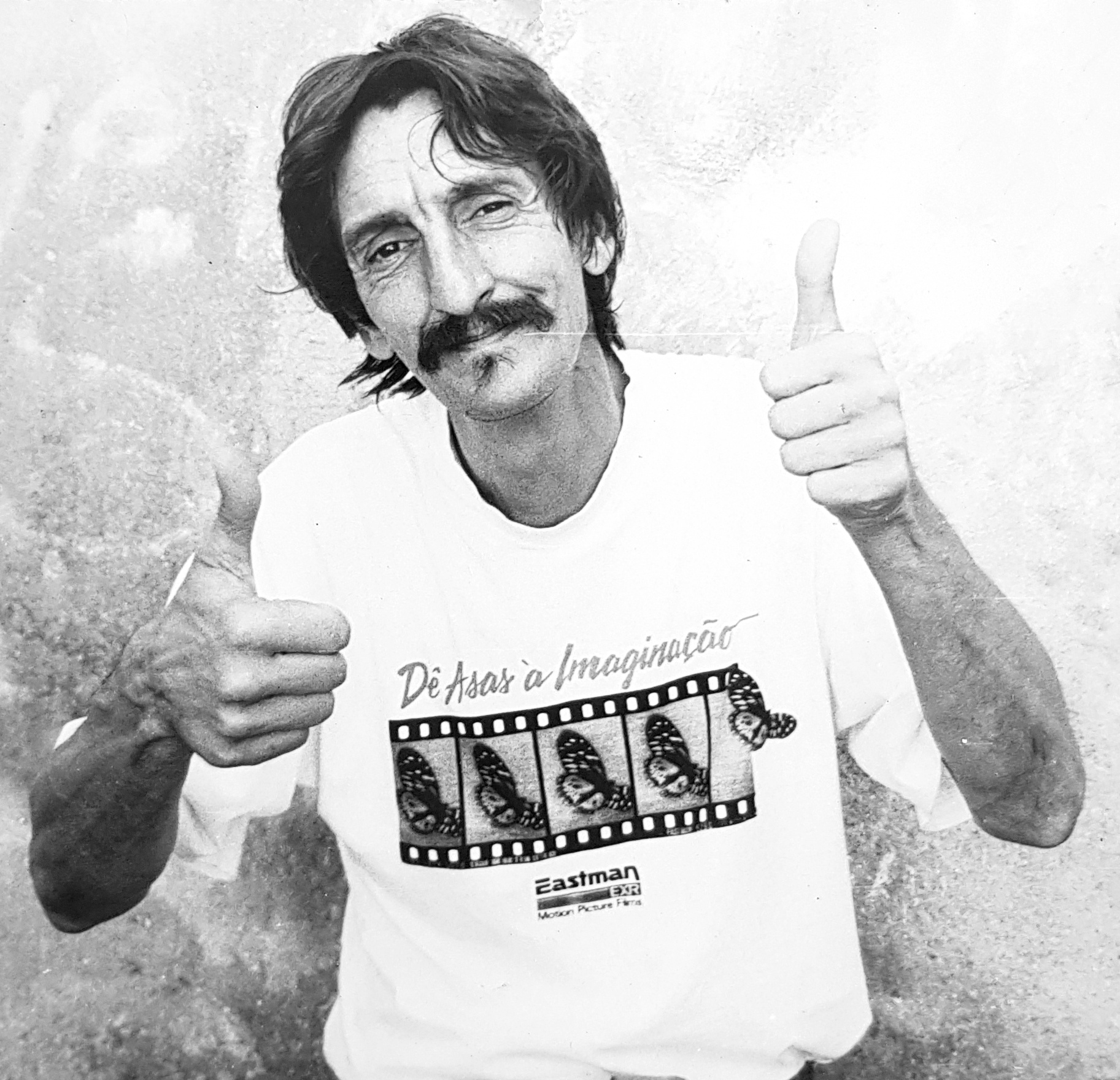 Retrato de Rubens Maia, artista e fotógrafo brasileiro